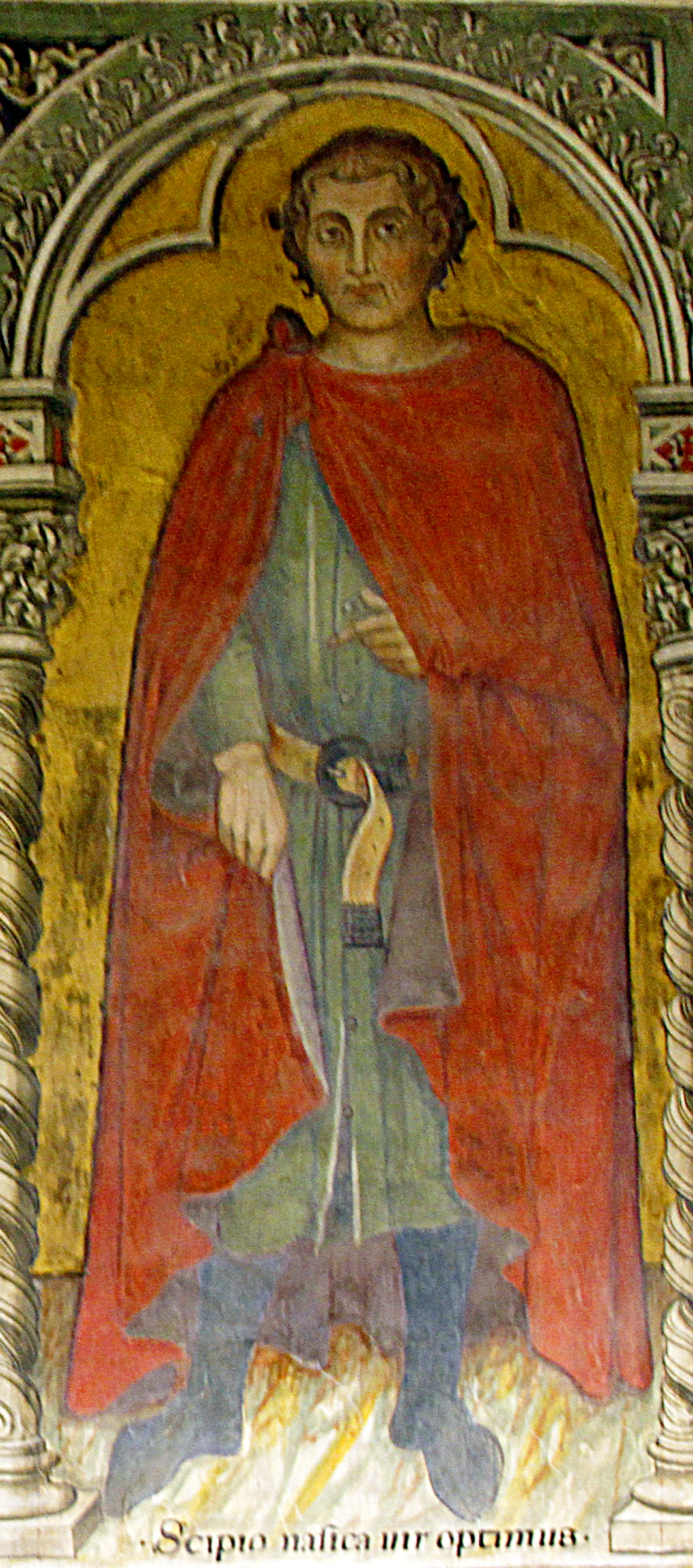 Palazzo Pubblico - Siena